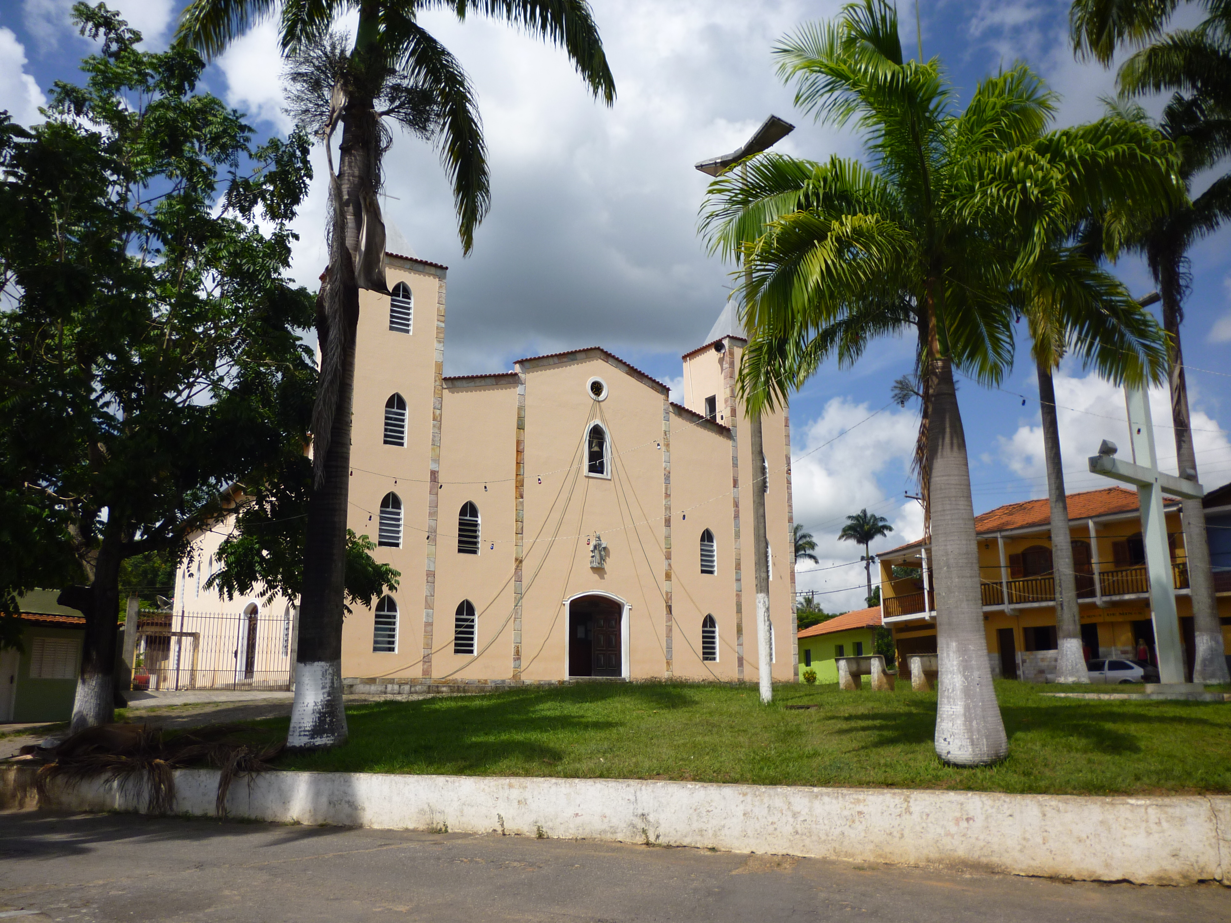 Acaiaca MG Brasil - Igreja Matriz de São Gonçalo